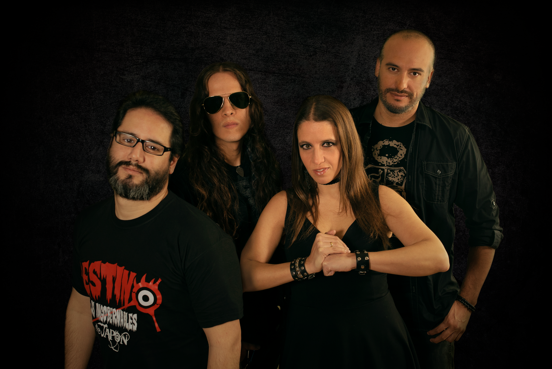 Ni Voz Ni Voto 2018